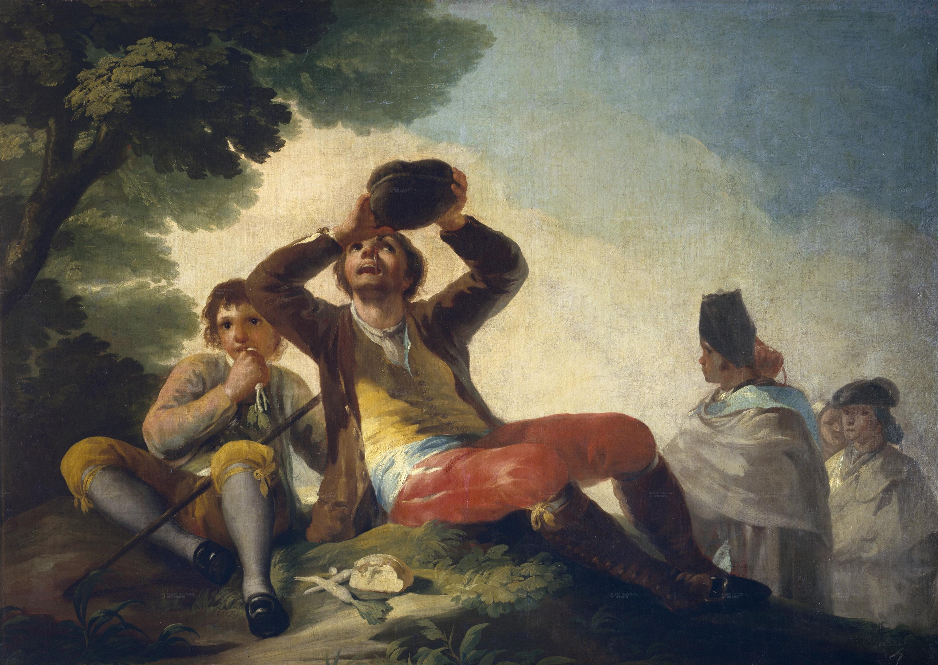 Cartones para tapices.